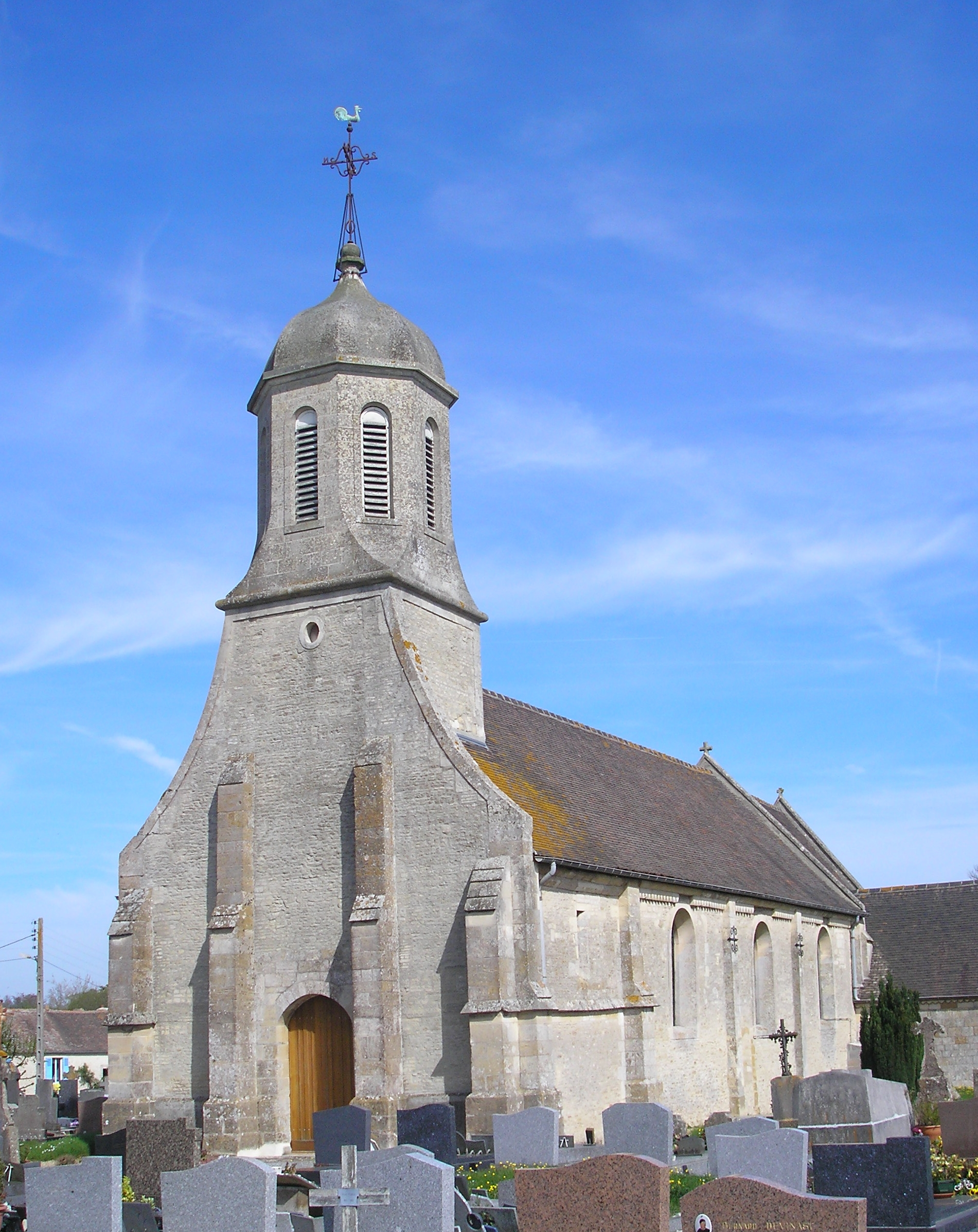 Escoville (Normandie, France). L'église Saint-Laurent.